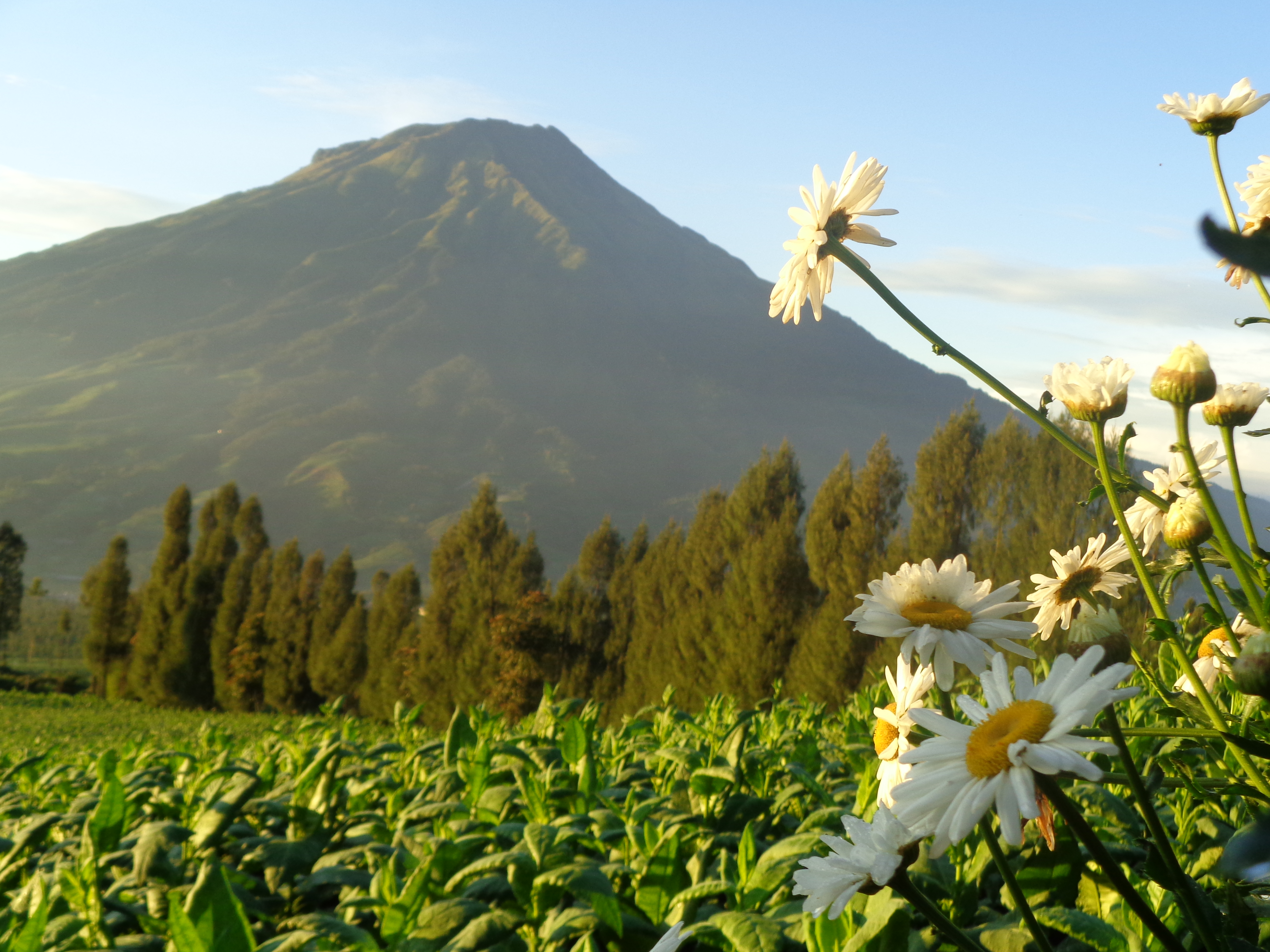 Bunga aster sungguh cantik dan biasa hidup di daerah pegunungan. Bunga ini tampak begitu indah tatkala pagi itu, matahari merekah, di lereng Gunung Sindoro, Temanggung, Jawa Tengah.